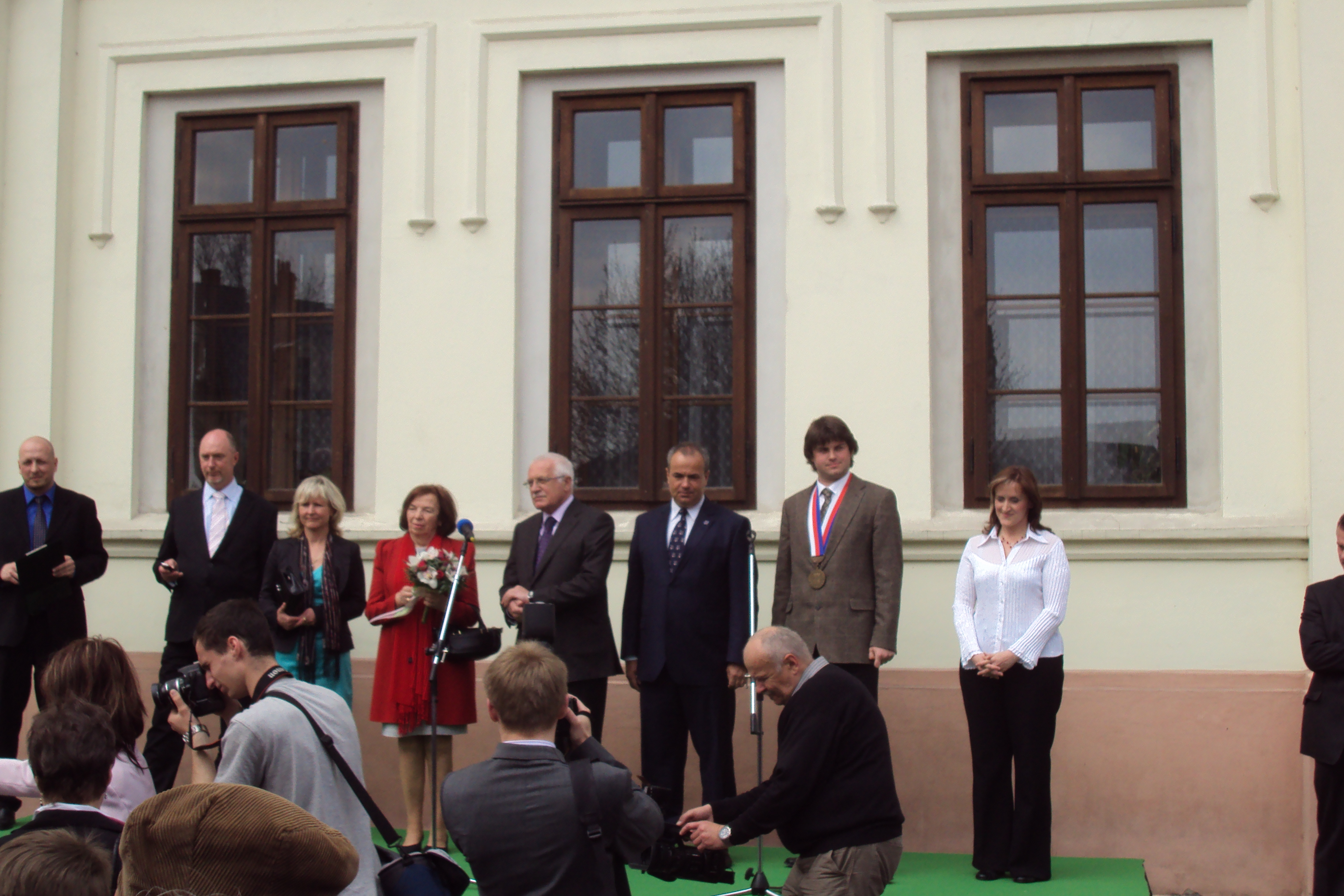 Delegace politiků na návštěve v Zákupech, prezident s chotí, hejtman Eichler, bývalý hejtman Skokan, starosta Zákup ing Lípa